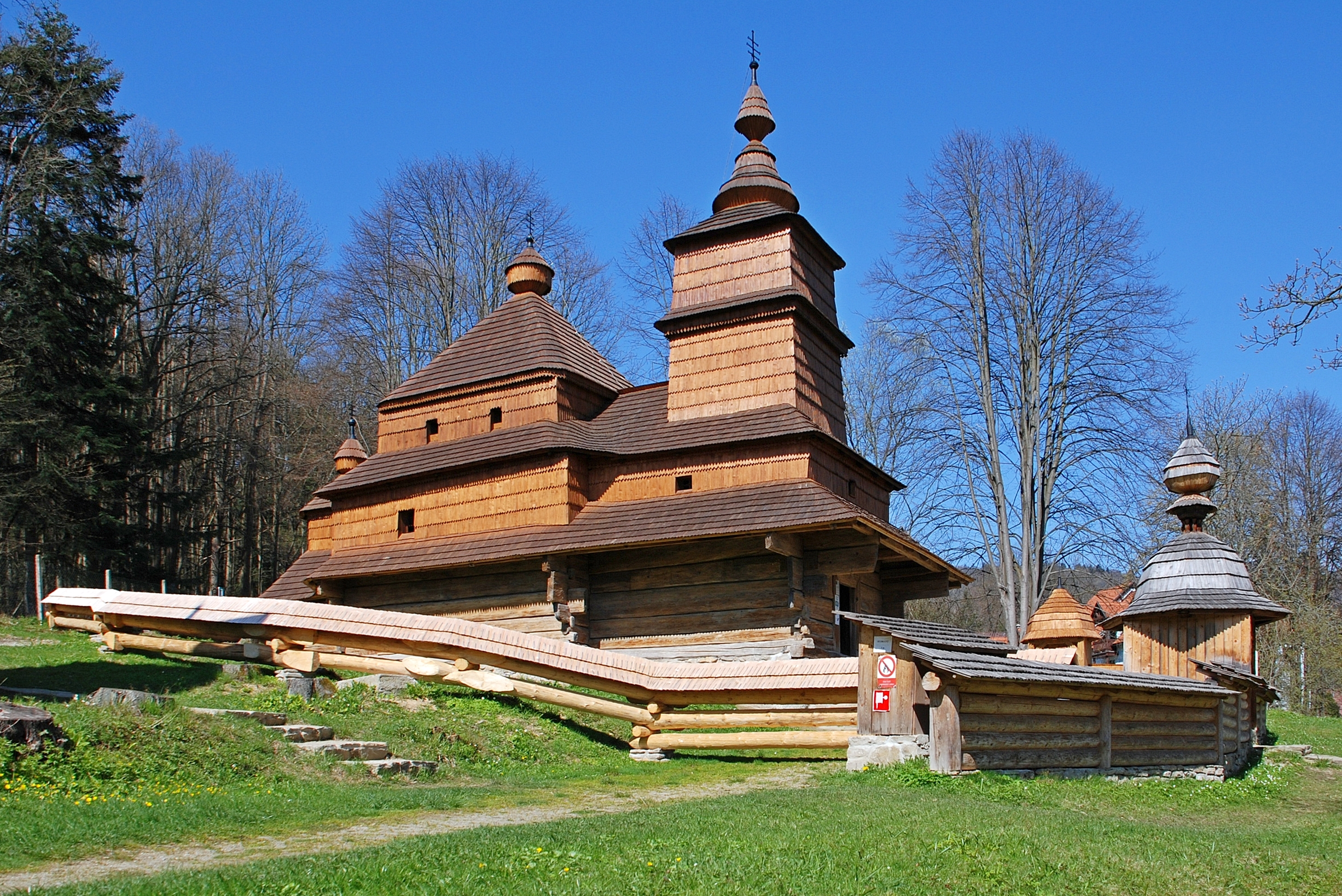 Bardejovské Kúpele, część miasta Bardejov